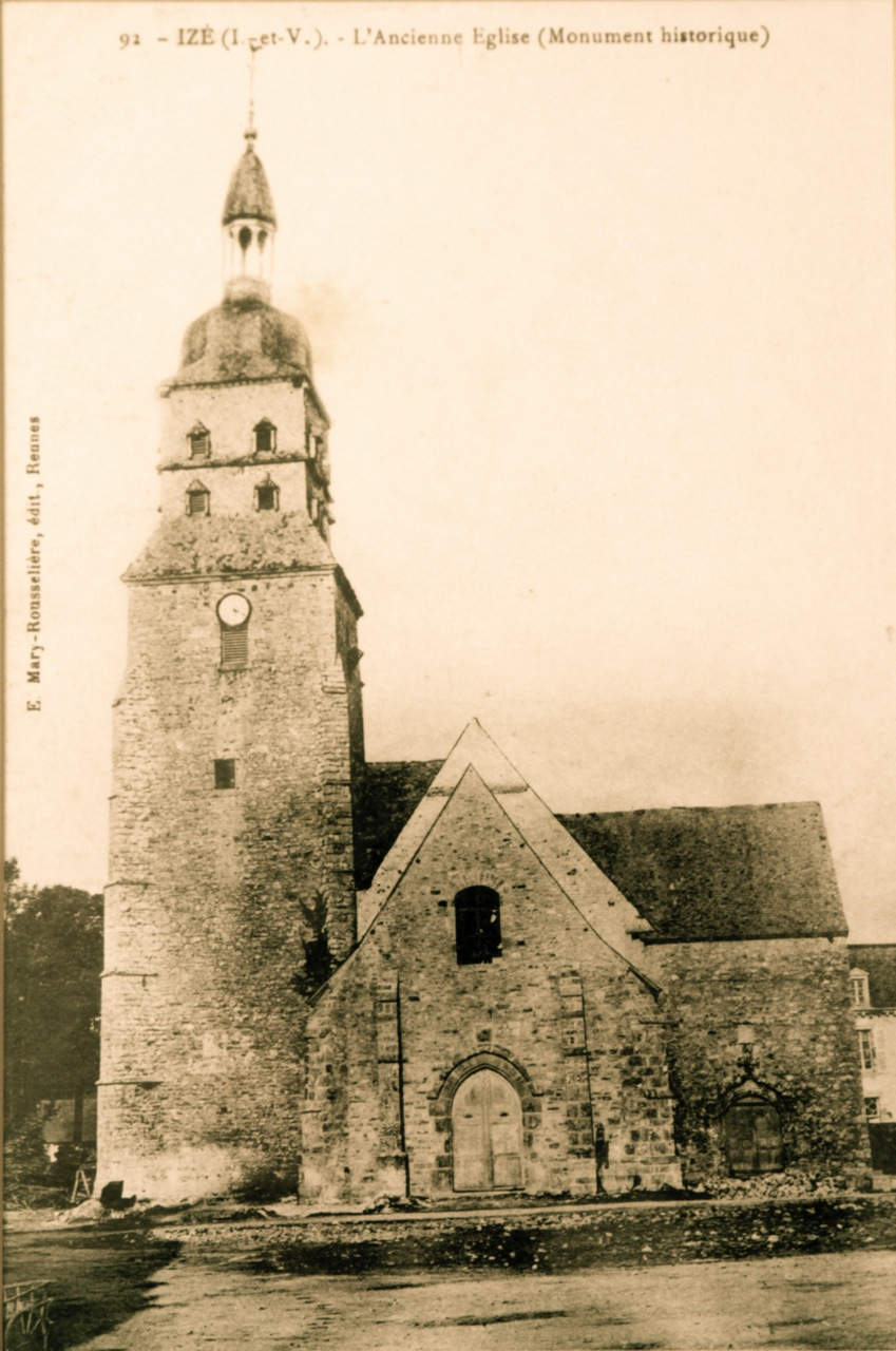 L'ancienne église Saint-Etienne de Val d'Izé vers 1900 (carte postale d'Edmond Mary-Rousselière)